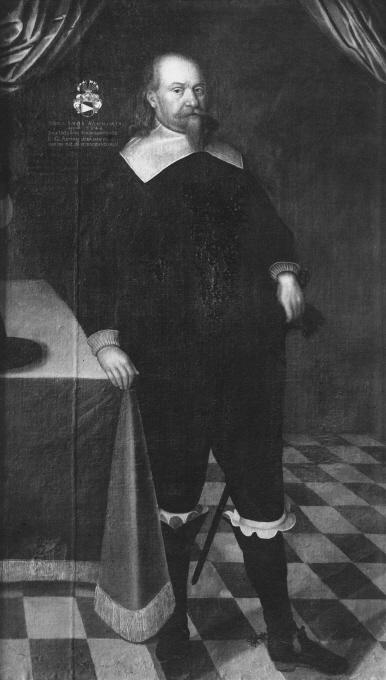 Peder Banér (1588–1644)